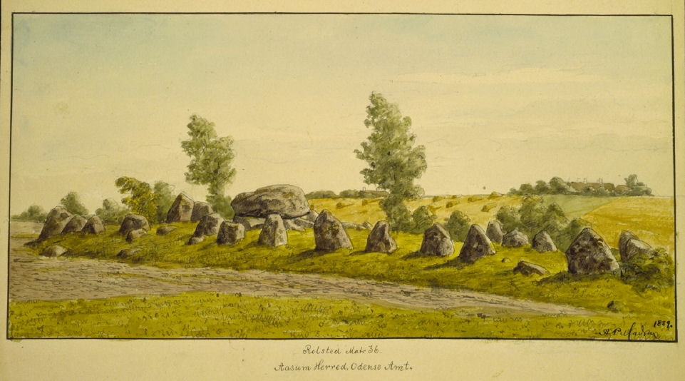 Akvarel af A.P. Madsen 1889. Dysse, Rolsted, matr. 36, sb. nr. 17, Åsum Herred, Odense Amt.